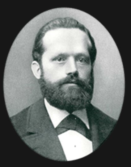 Vollenweider AG, Horgen ZH, Schweiz